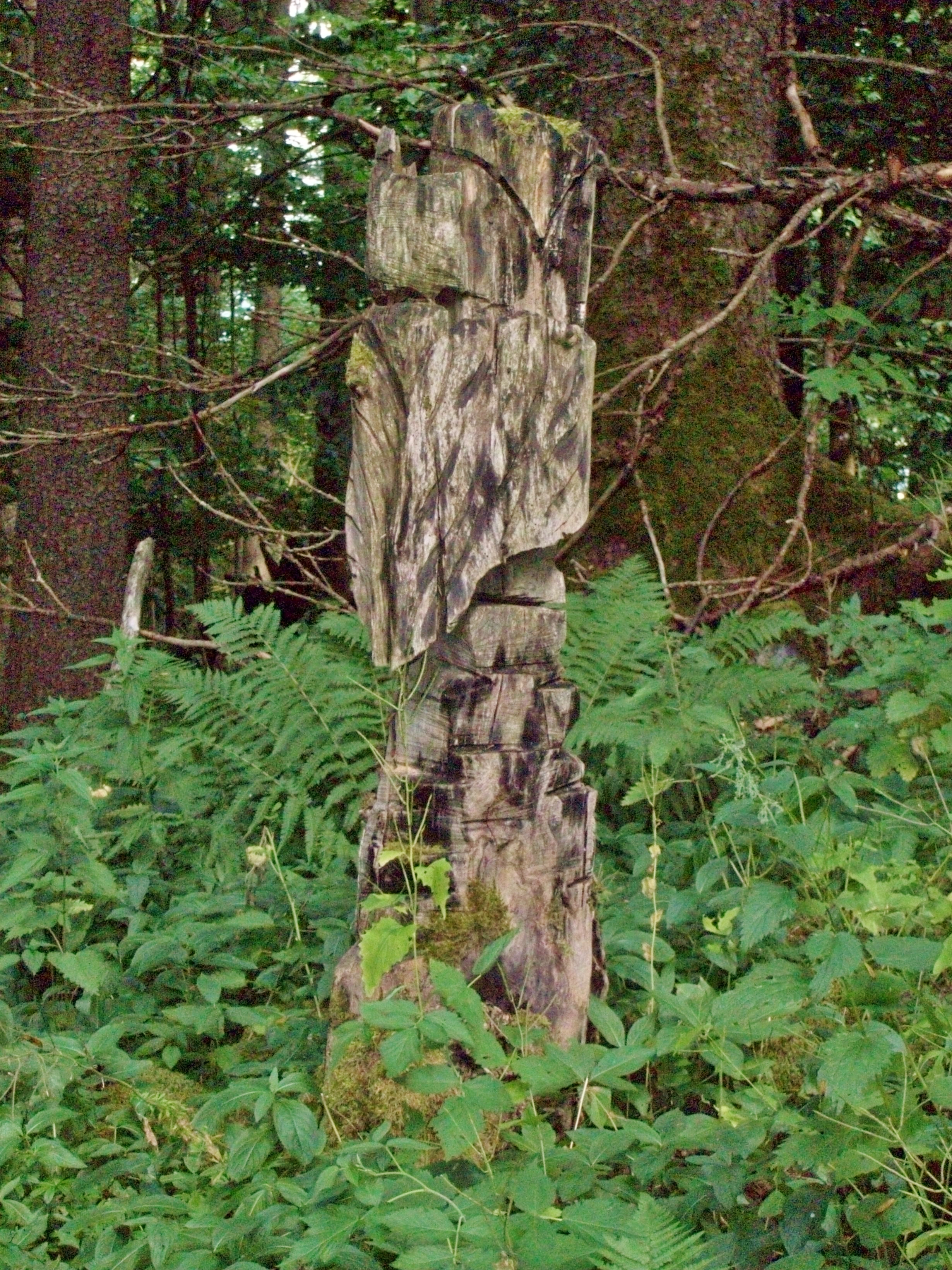 Die Wallanlage auf dem Gangolfsberg: Der geschnitzte Merowinger. Auf dem Naturlehrpfad findet sich eine Vielzahl dieser geschnitzten Figuren unterschiedlichster Sujets, die auf den Wald, die Anlage und die Geotope Bezug nehmen